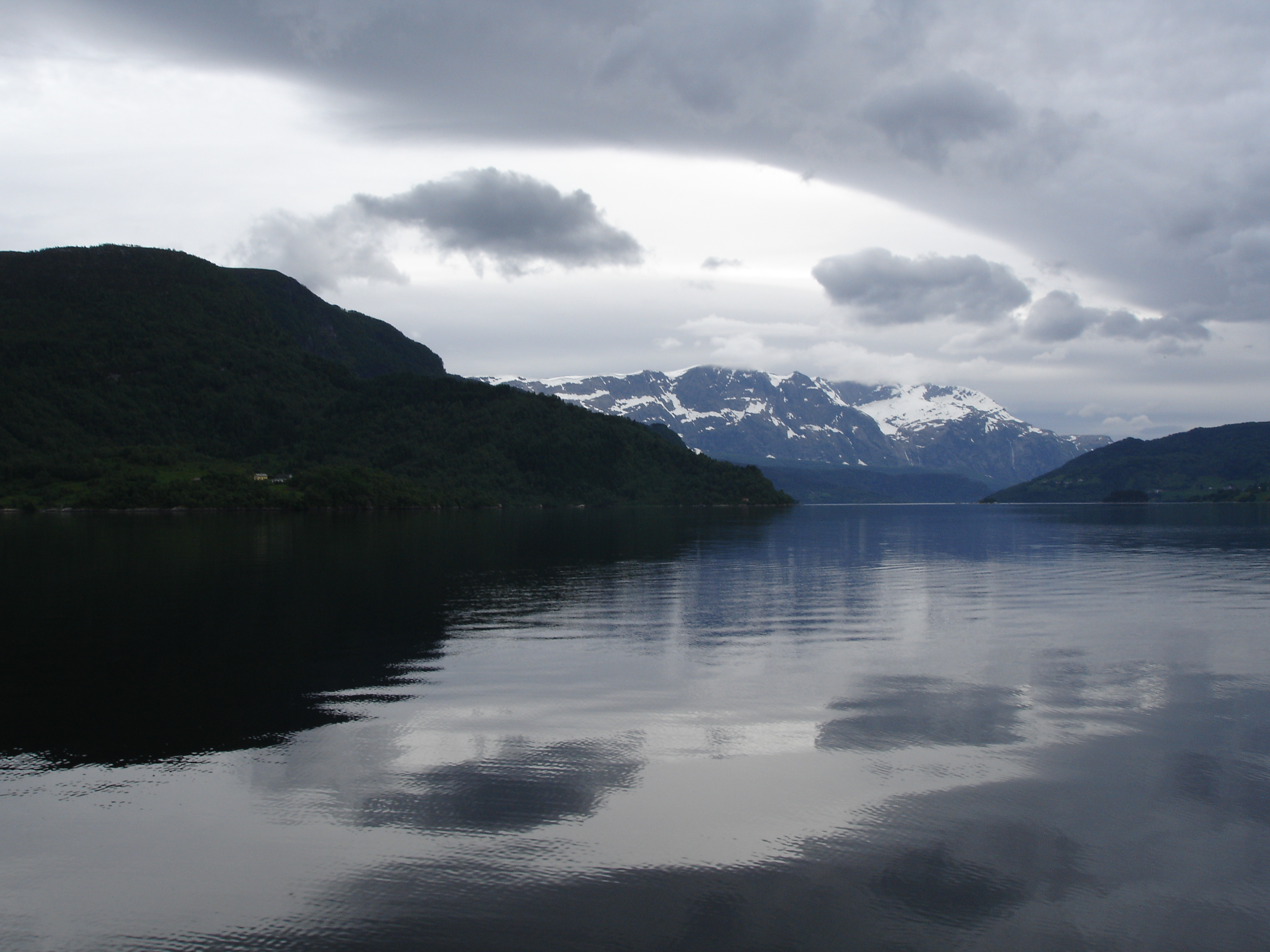 Ved Førdefjorden.